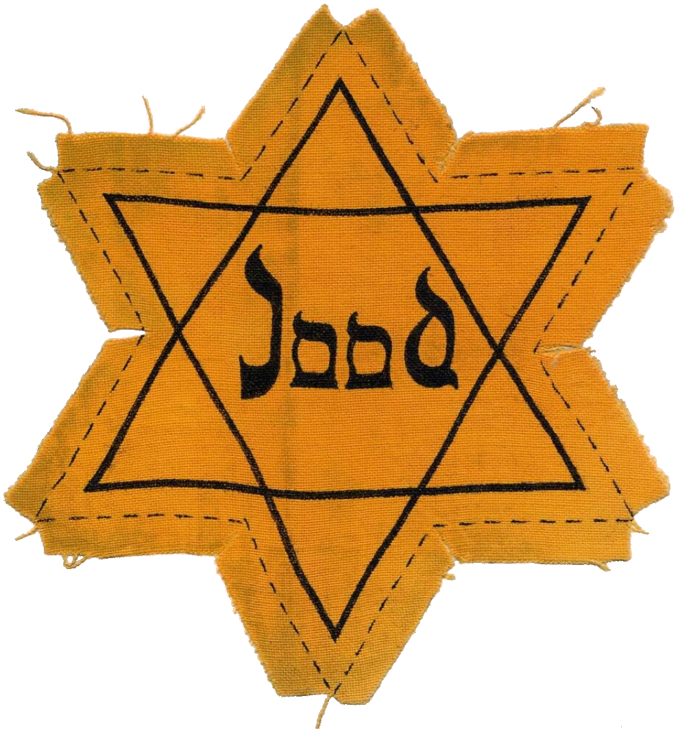 Jodenster. 1942. Nederland. Collectie Museon Museum Den Haag.